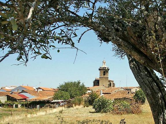 Guijo de Coria, Cáceres (España)